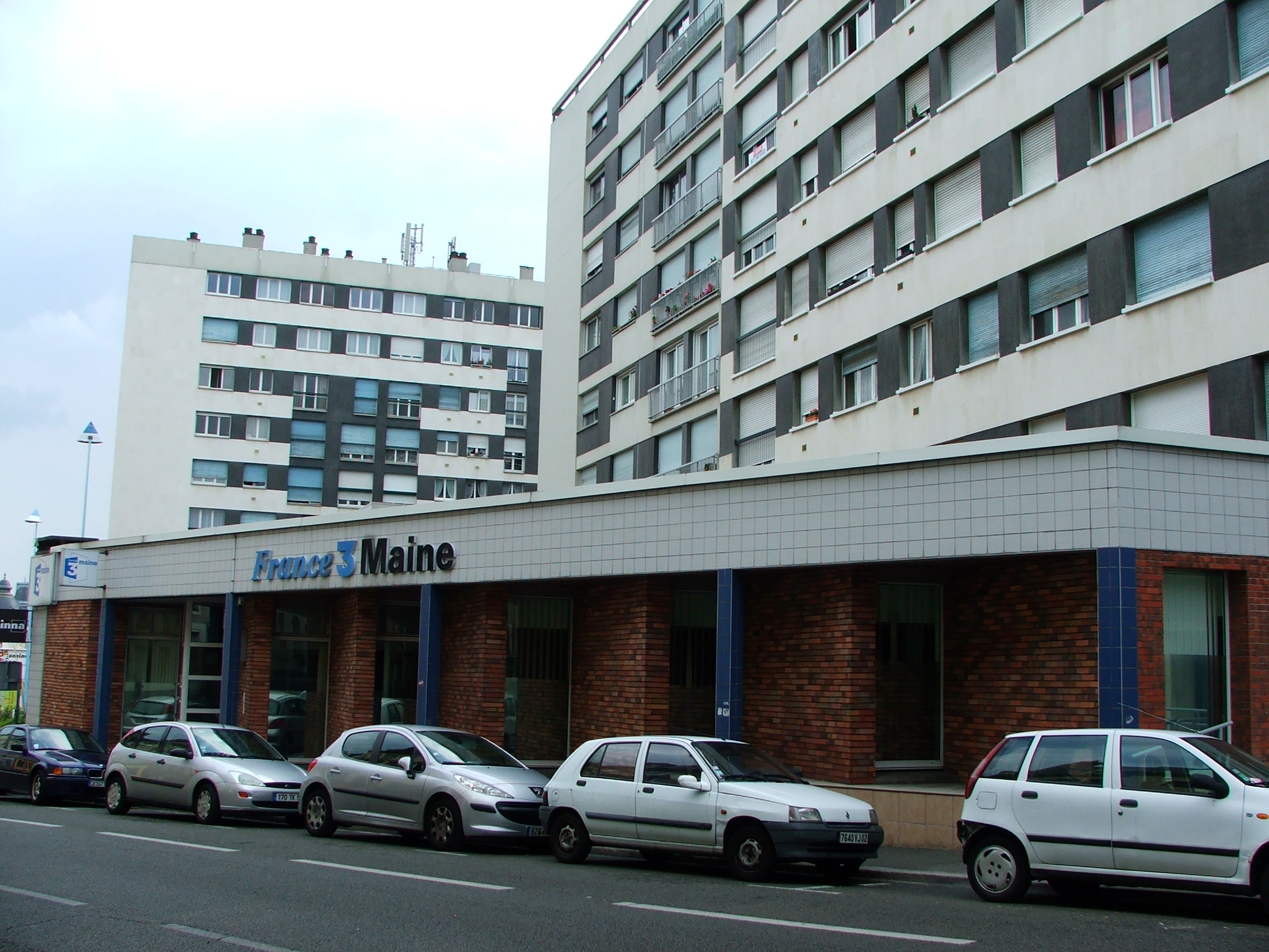 Les locaux de France 3 Maine à la jointure des quartiers Jacobins et Bollée, Le Mans.